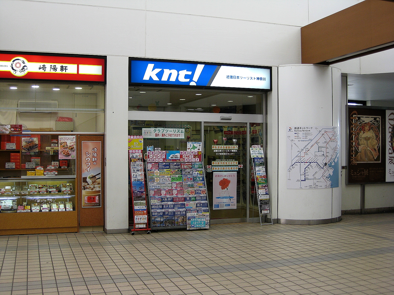 近畿日本ツーリスト神奈川 三ツ境駅旅行センター （横浜市瀬谷区）